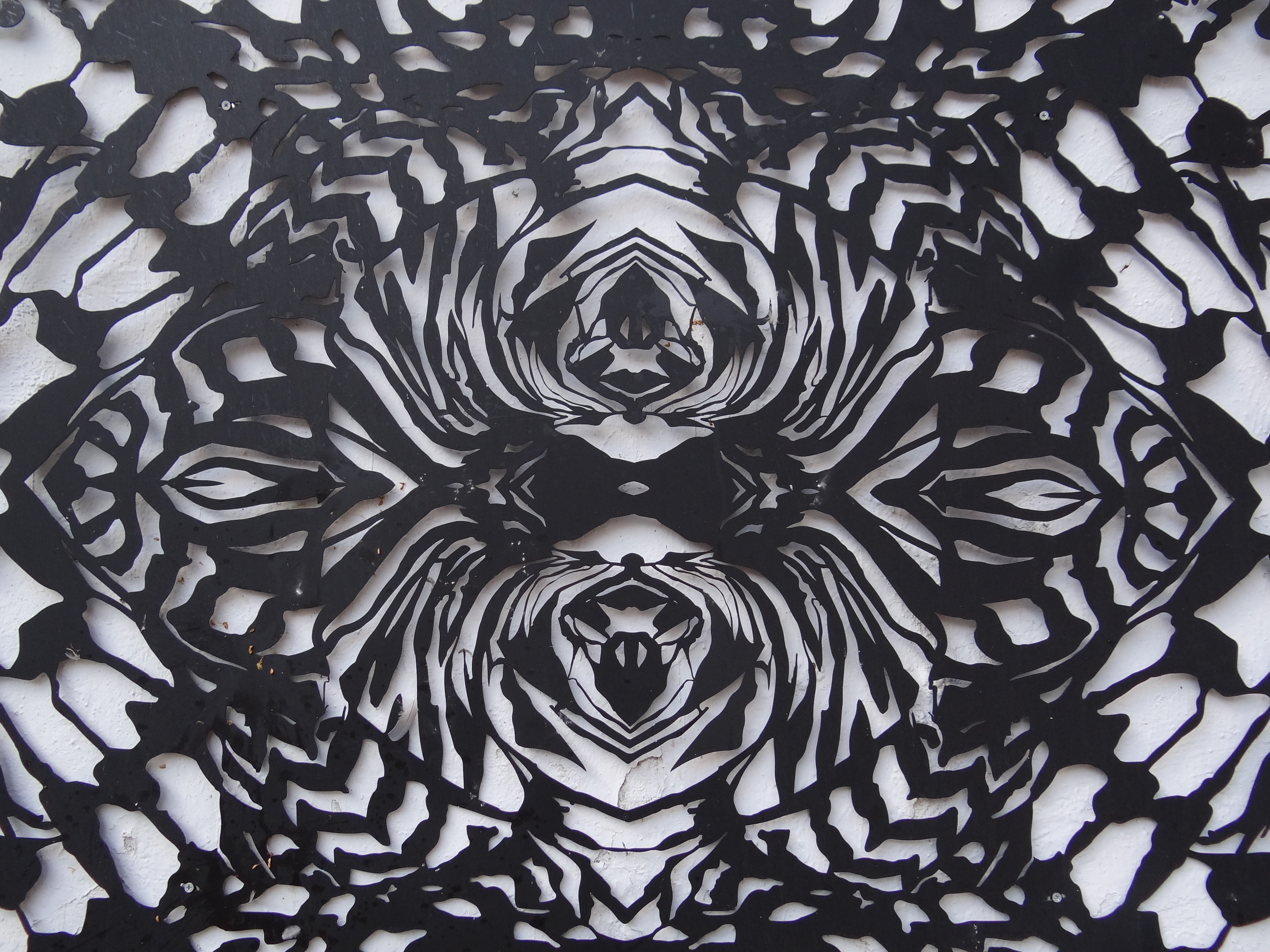 חלק מיצירה על קיר מבנה בואדי ניסנאס. הפסל:אולי קרן ענבי. השילוט במקום לא ברור